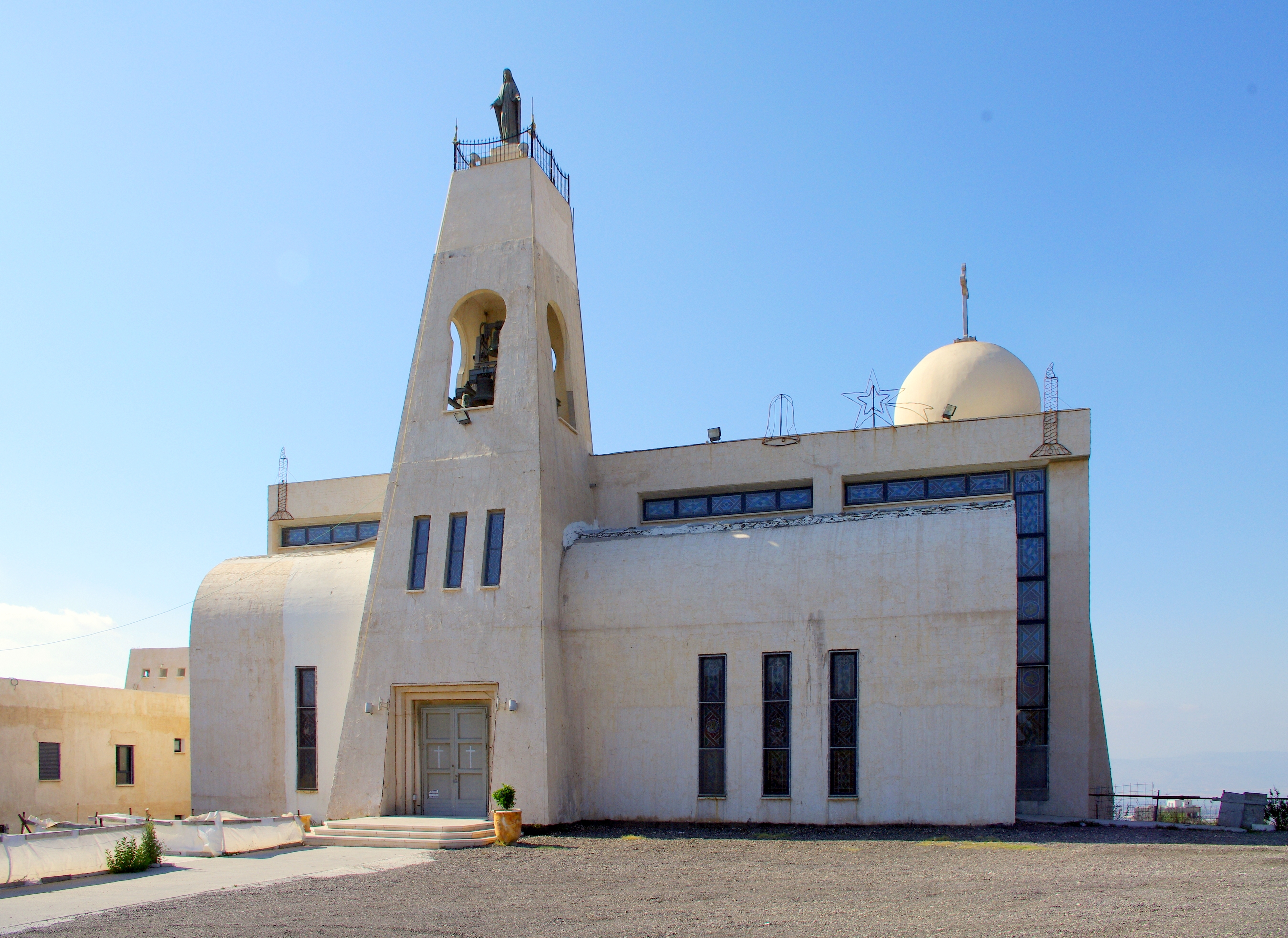 Katolícky kostol